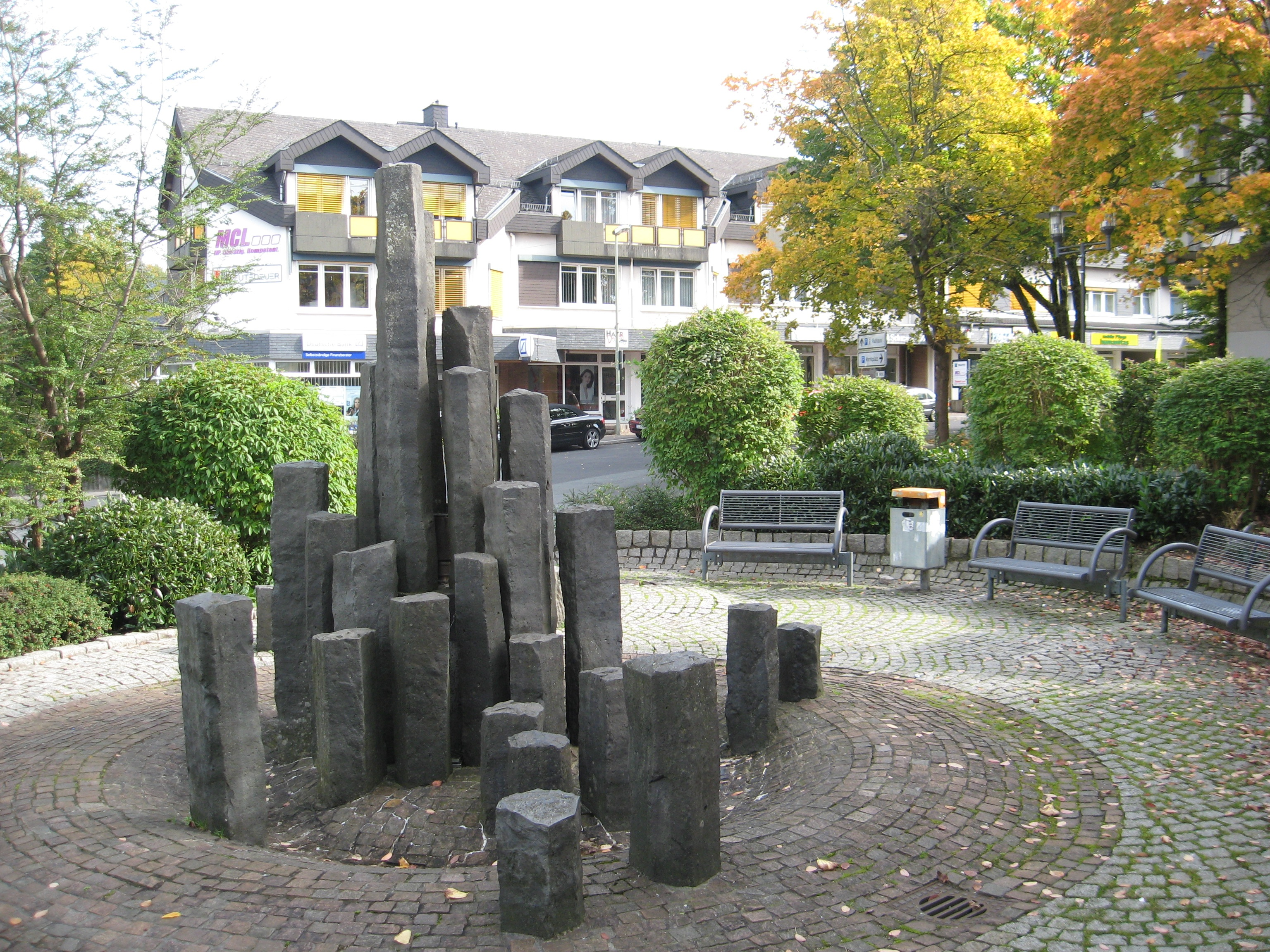 Brunnen im Einkaufszentrum in Wilnsdorf / Water well in Wilnsdorf